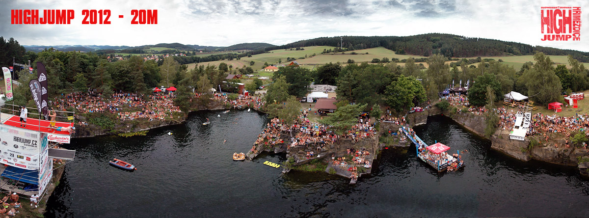 Zavody Highjump 2012 foto03